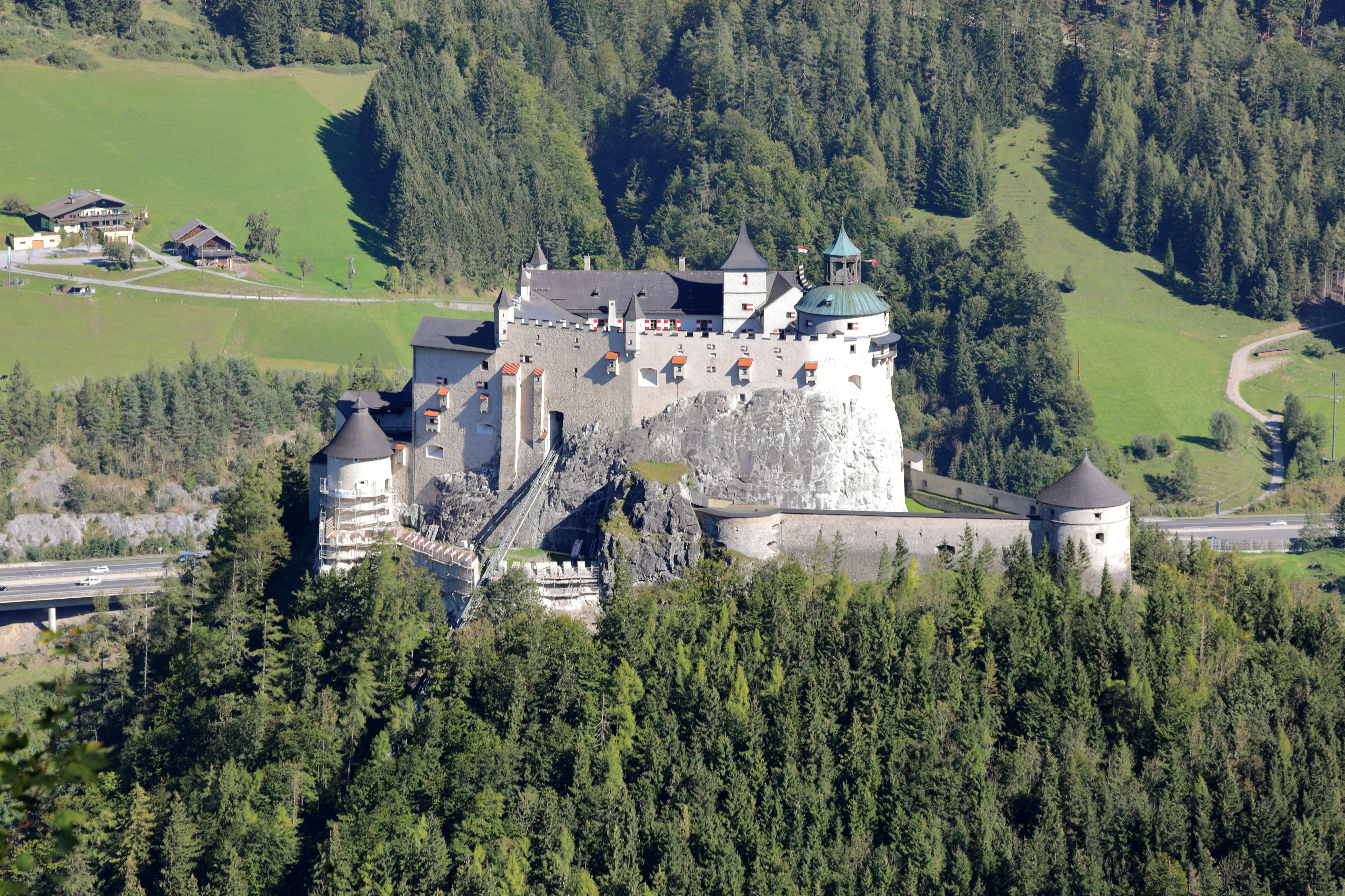 Westansicht der Burg Hohenwerfen, auch als Festung Hohenwerfen bezeichnet, in der Salzburger Marktgemeinde Werfen.Die ab dem 11. Jahrhundert errichtete Burg war ein strategisches Bollwerk zwischen dem Tennen- und Hagengebirge auf einem 155 Meter hohen markanten Felskegel im Salzachtal.